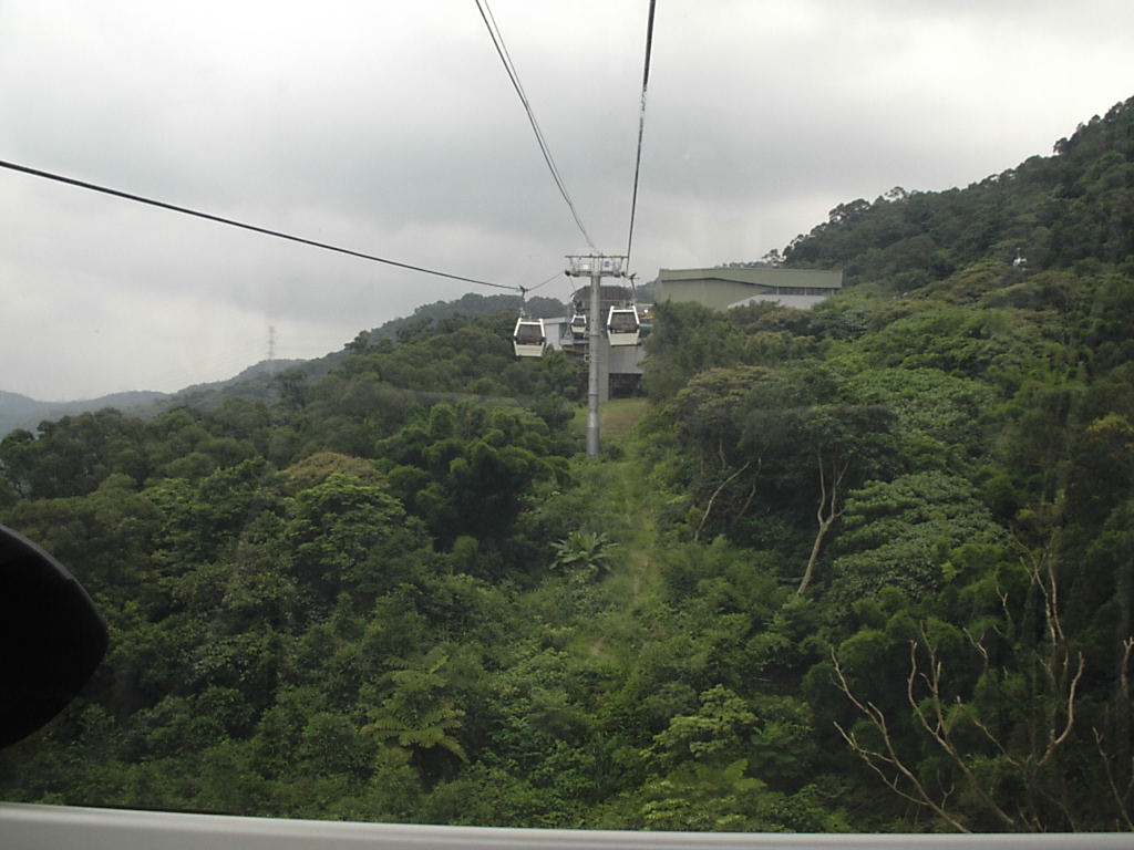 臺北貓空纜車。 Bân-lâm-gú: Tâi-pak Niau-khang lám-tshia.